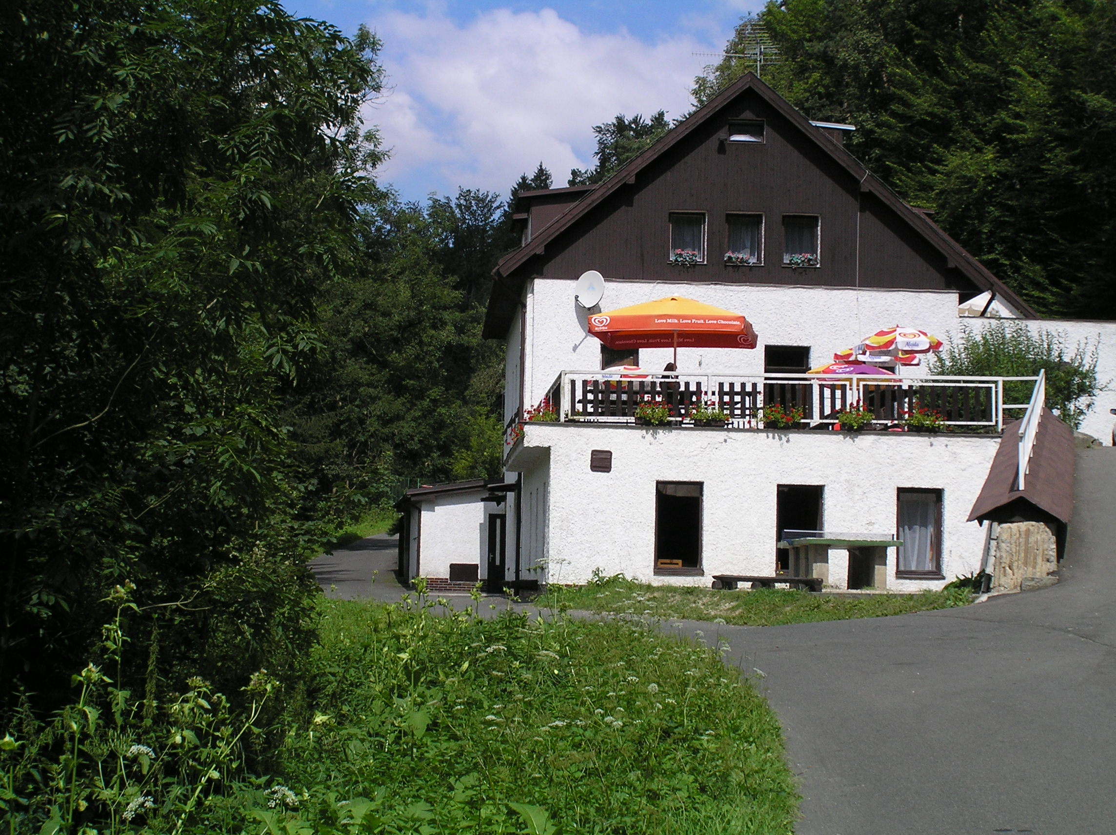 Slapy (u Frýdštejna) - chata Bartošova pec (čp. 8)